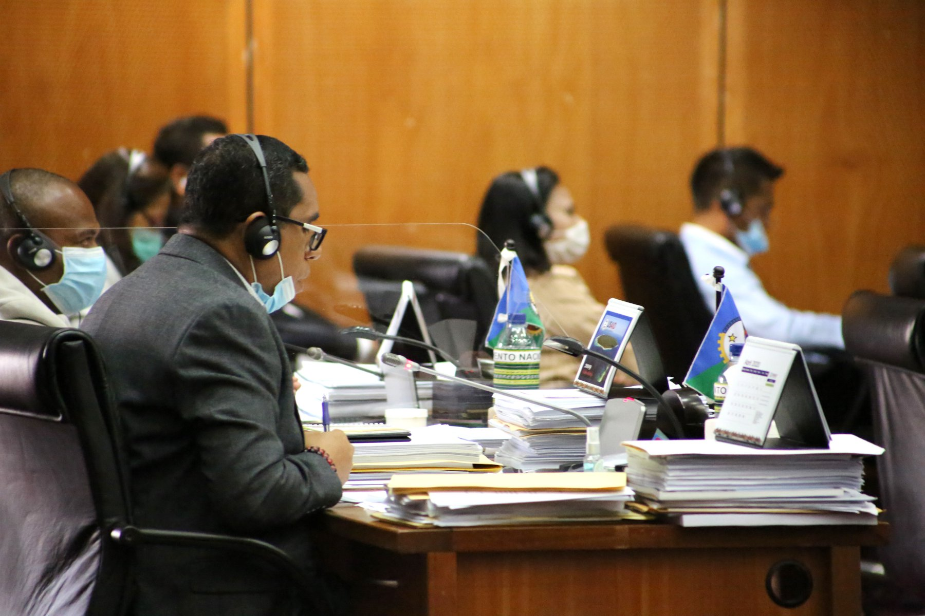 Francisco de Vasconcelos in der Sitzung zur Verlängerung des Ausnahmezustandes im Nationalparlament Osttimors